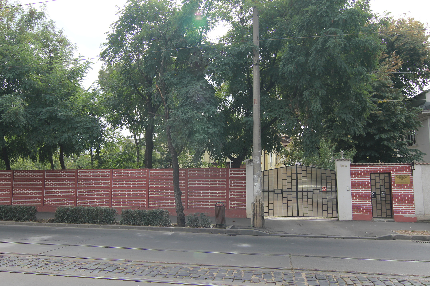 Casă pe Dudești